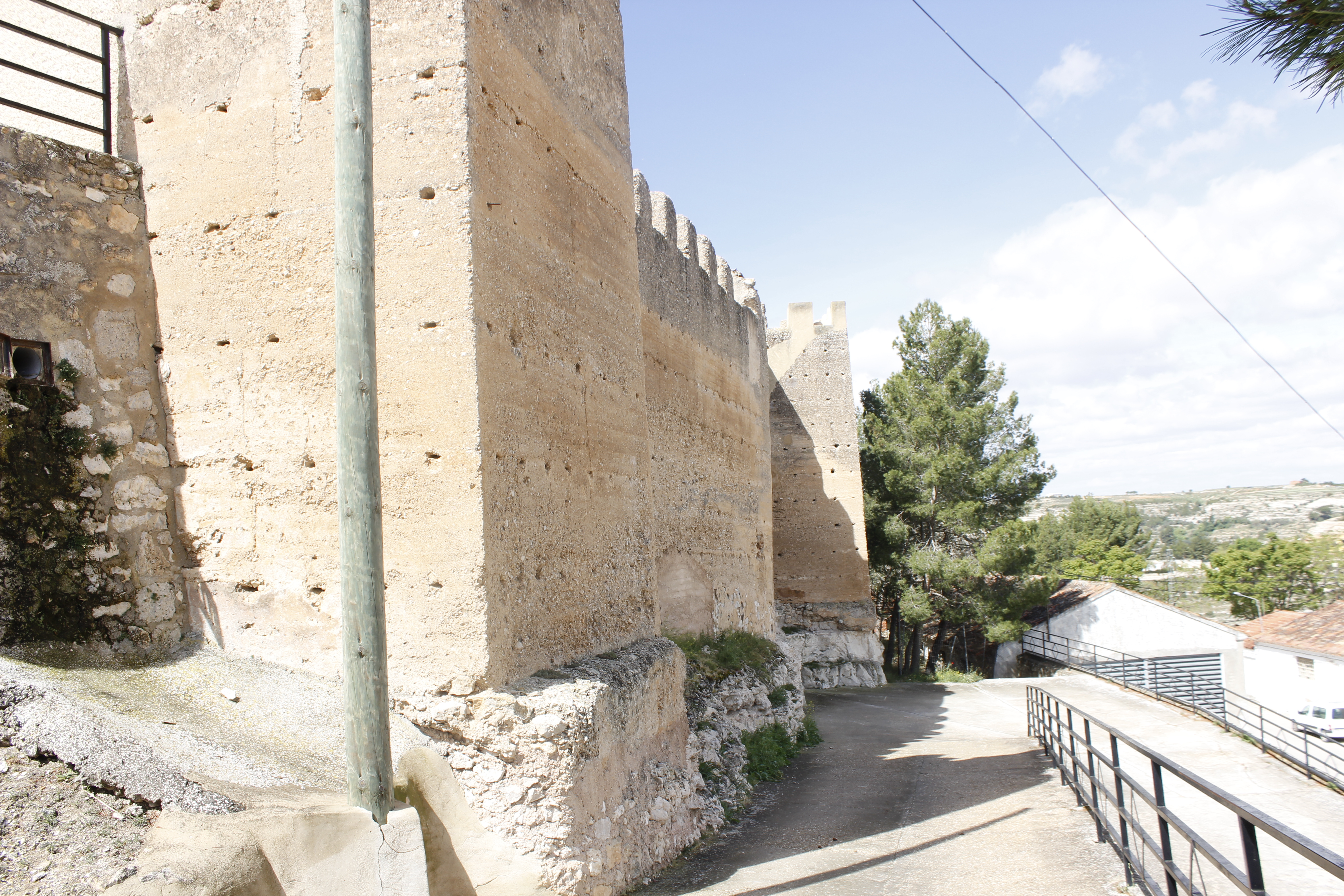 Pendiente